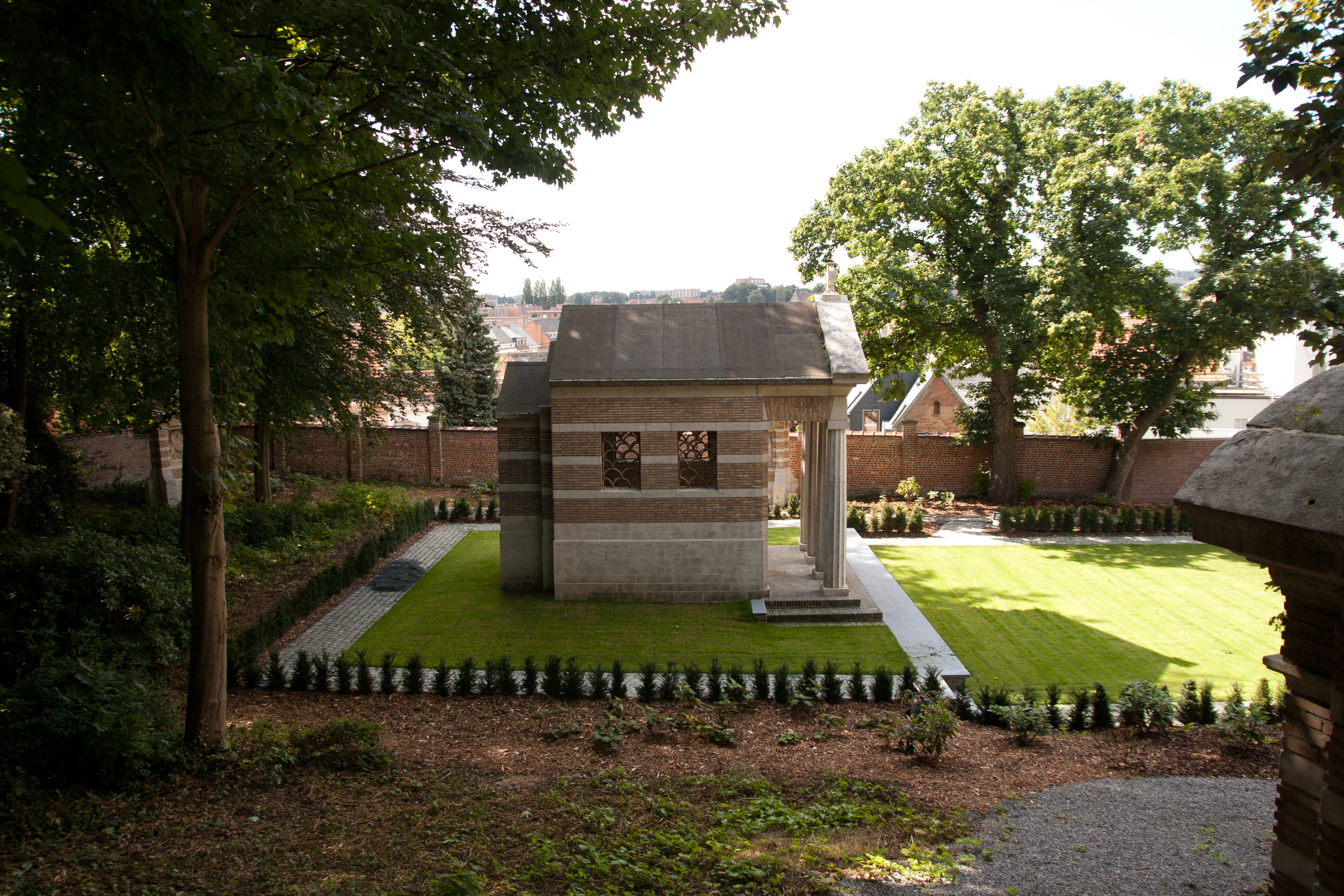 Devotiehof Sint Josef Ramberg, Leuven